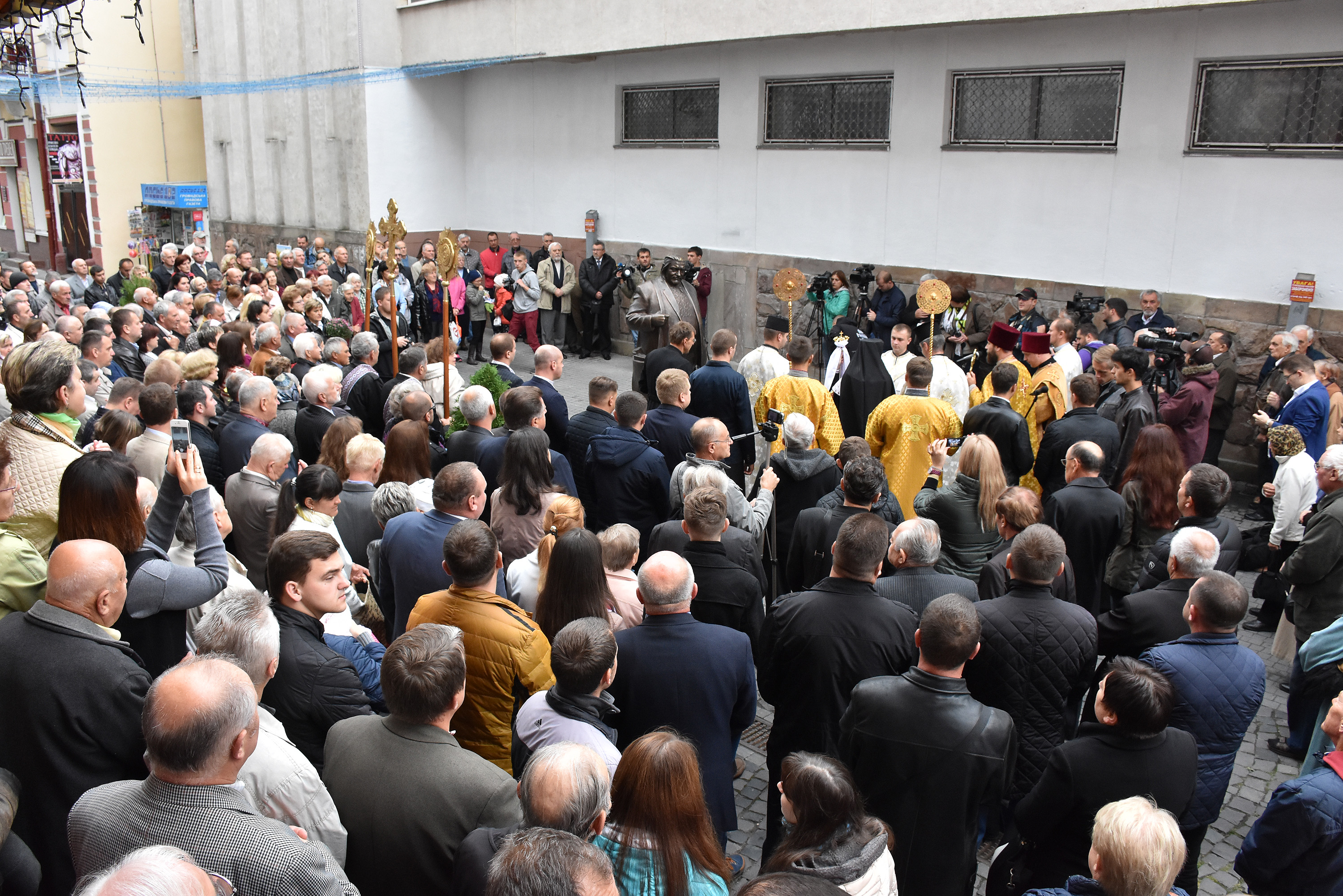 Відкриття пам'ятника українському археологу, мистецтвознавцю, історику, поету, викладачу і громадсько-політичному діячеві Ігорю Ґереті на вулиці Валовій у Тернополі.